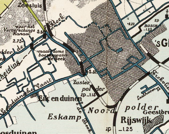 Zusterpolder